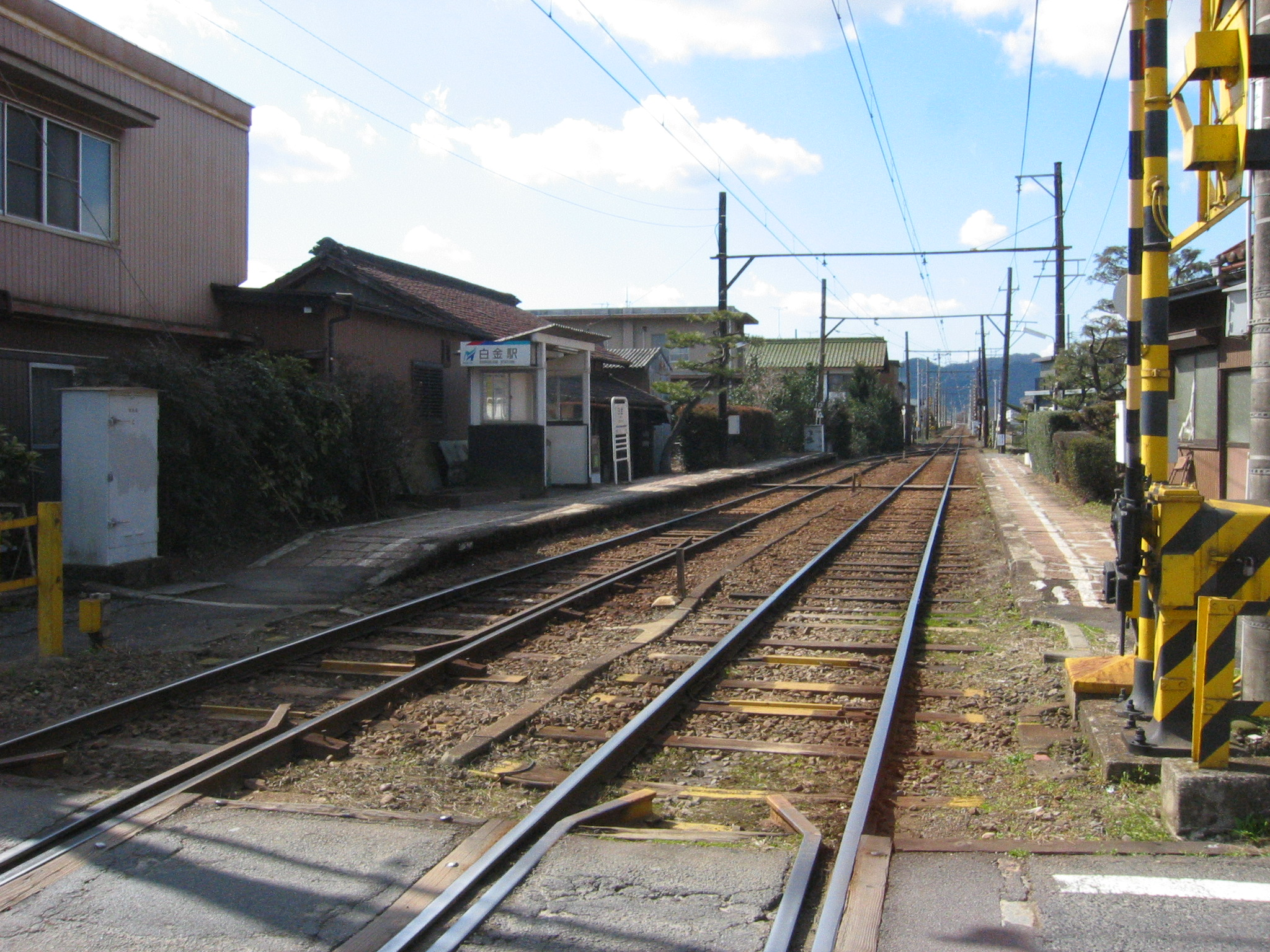 在りし日の旧名鉄白金駅ホーム。